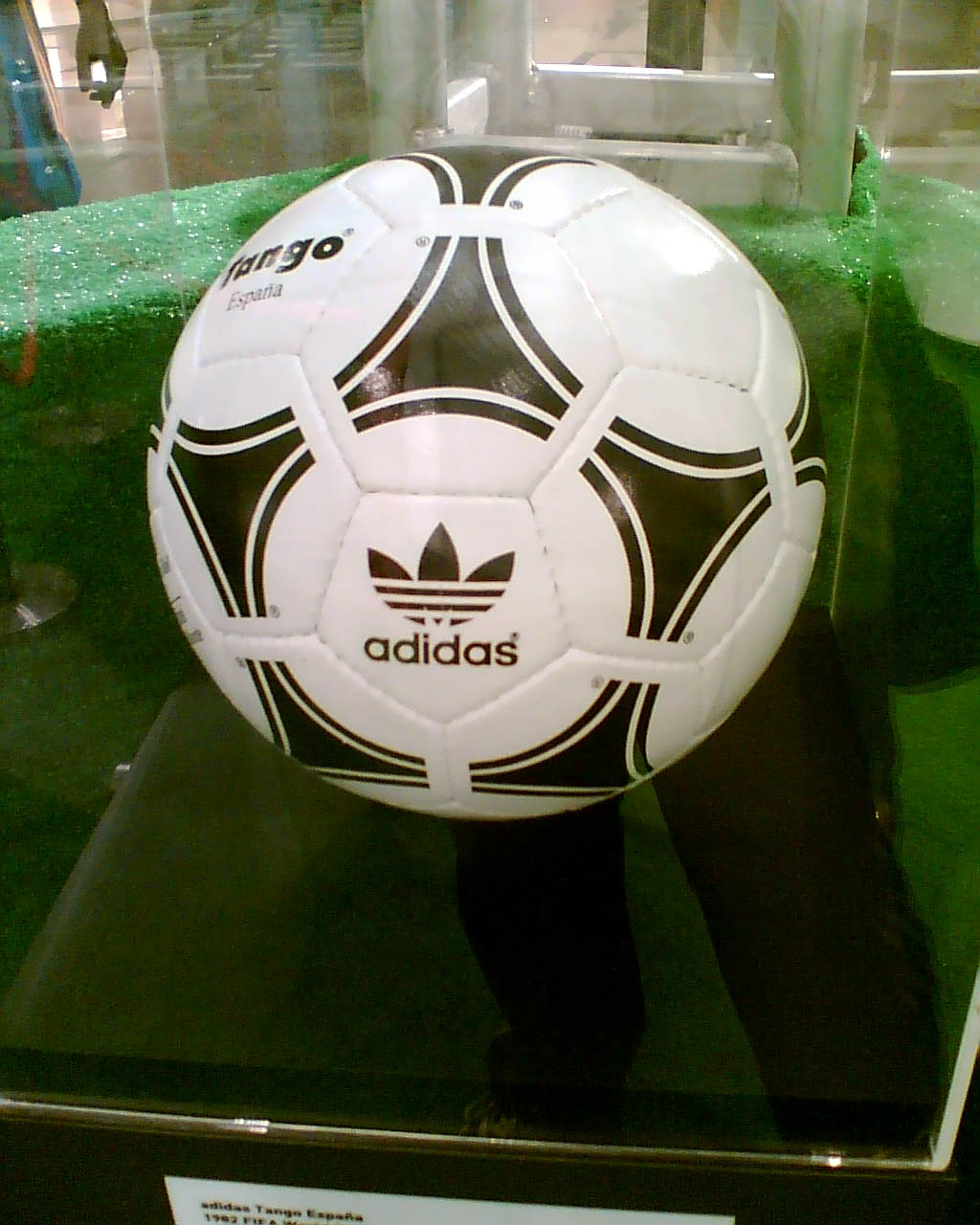 中文（香港）: 愛迪達Tango Espana